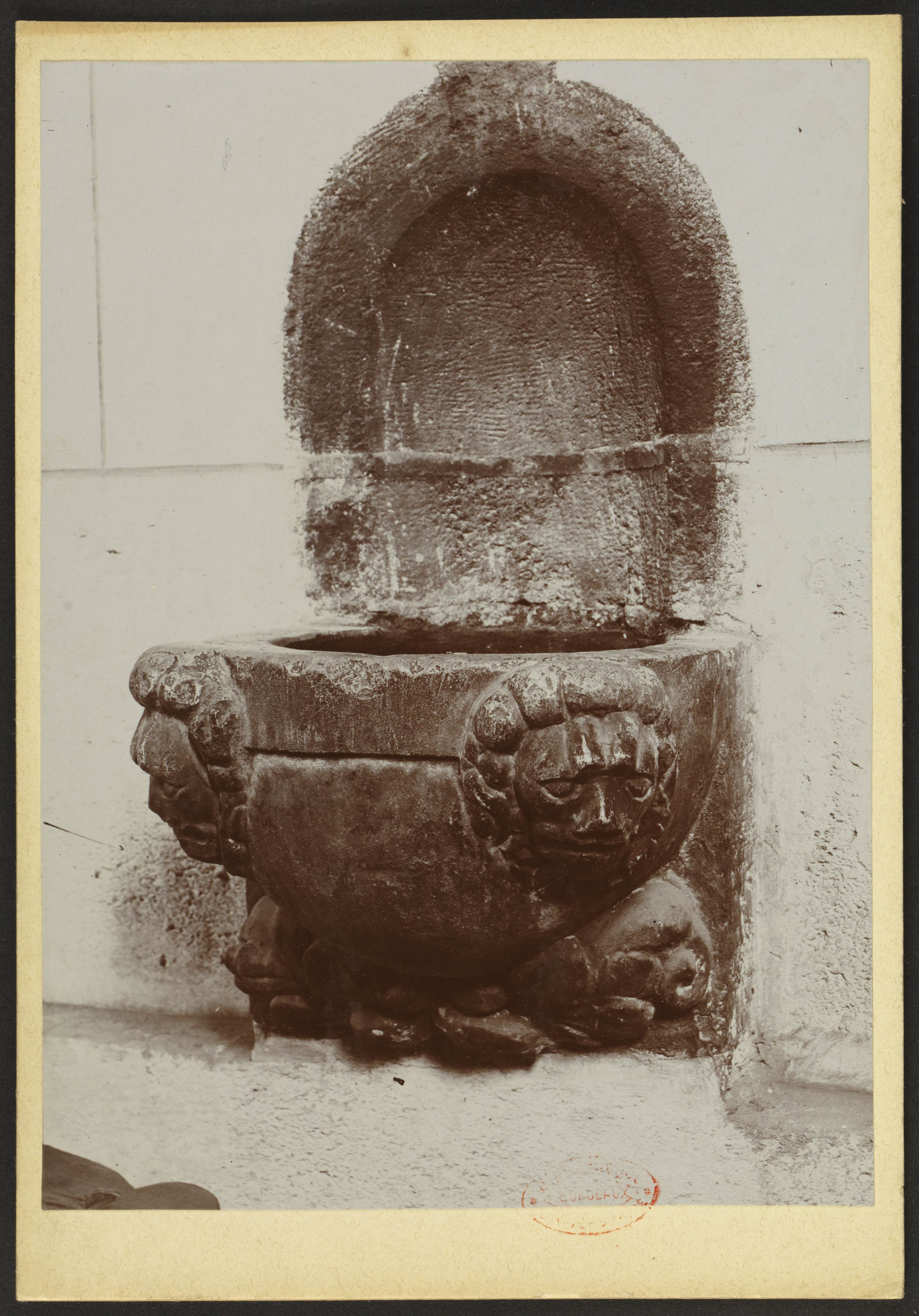 Église Saint-Martin de Samonac; Bénitier en pierre